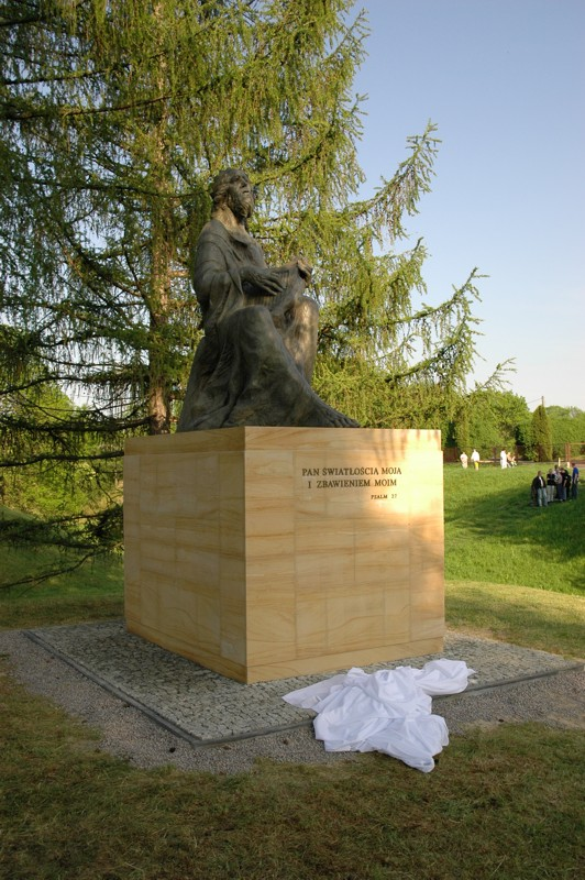 Pomnik Dawida Psalmisty w Zamościu